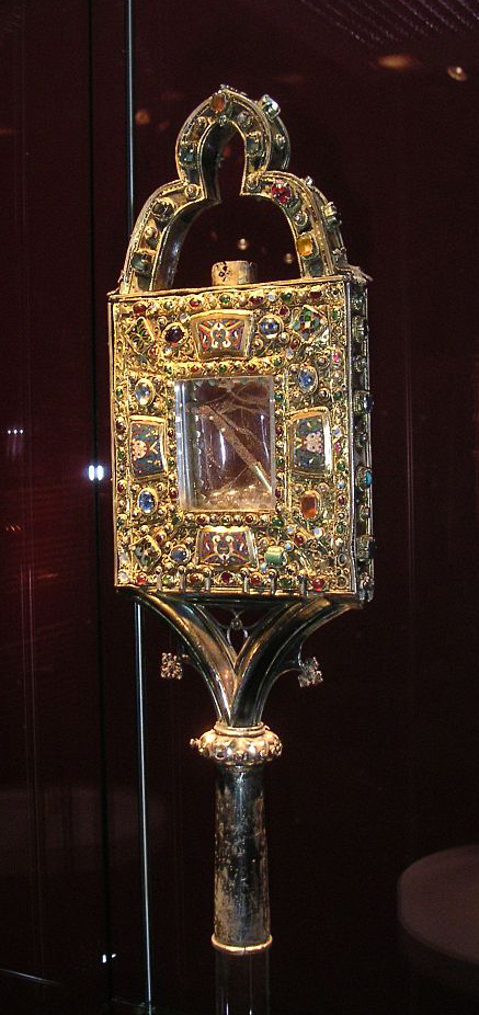 Kreuznagelreliquiar der Äbtissin Theophanu, Essener Domschatzkammer Inv. Nr. 8, aufgenommen in der Ausstellung "Gold vor Schwarz"